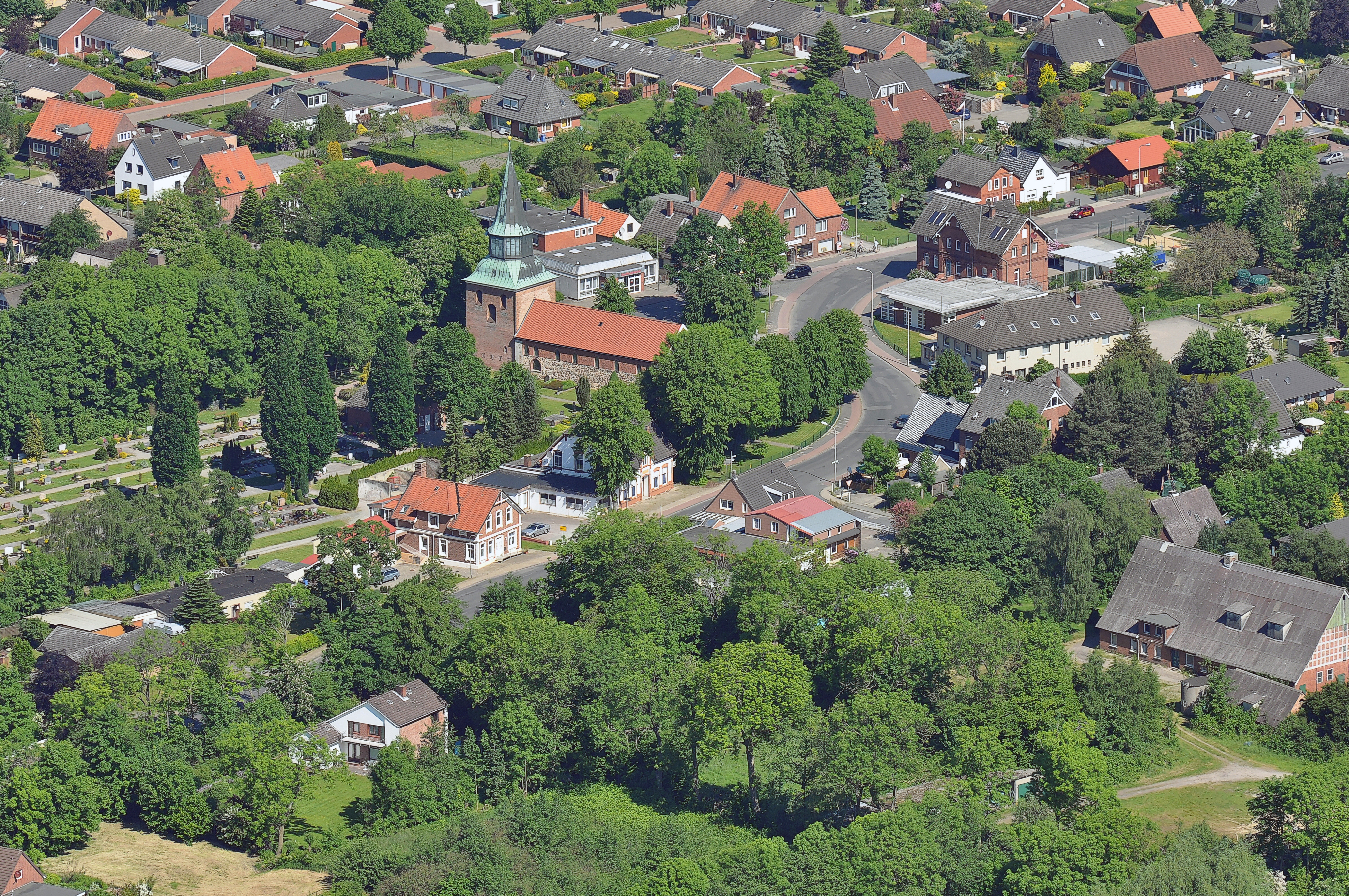 Luftbilder von der Nordseeküste 2012-05